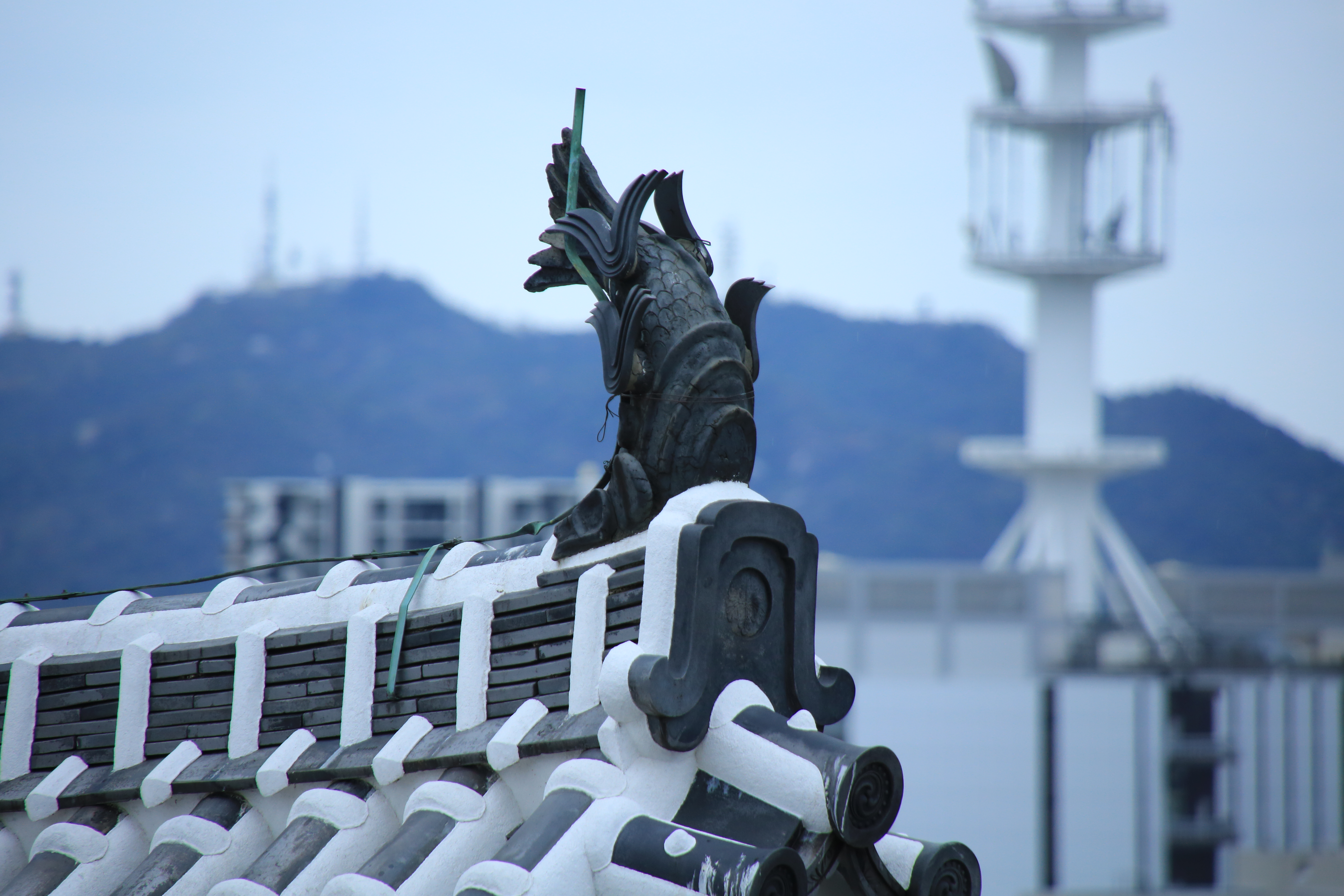 20160403_Himeji-Castle_3385